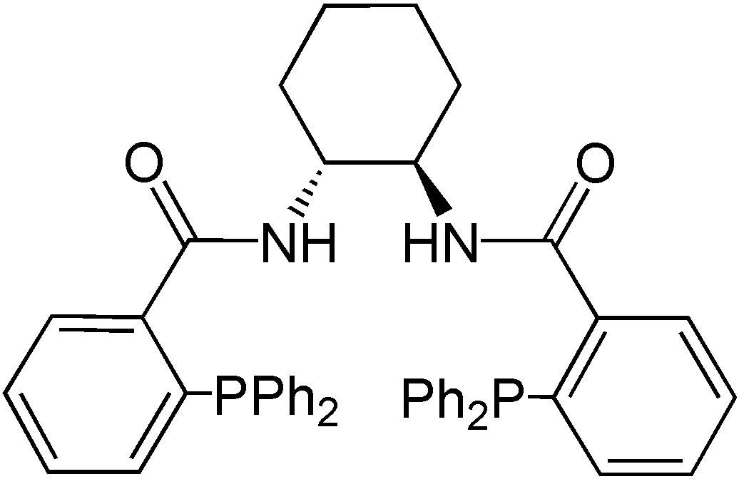 Struktur des Trost-Liganden